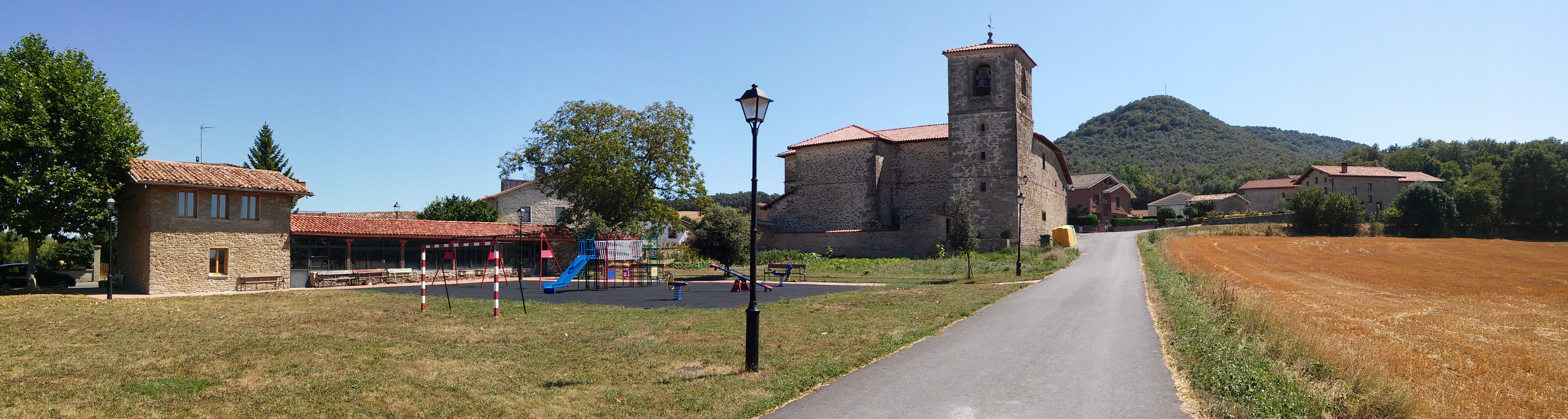 Gasteizko Gometxa herriaren ikuspegia